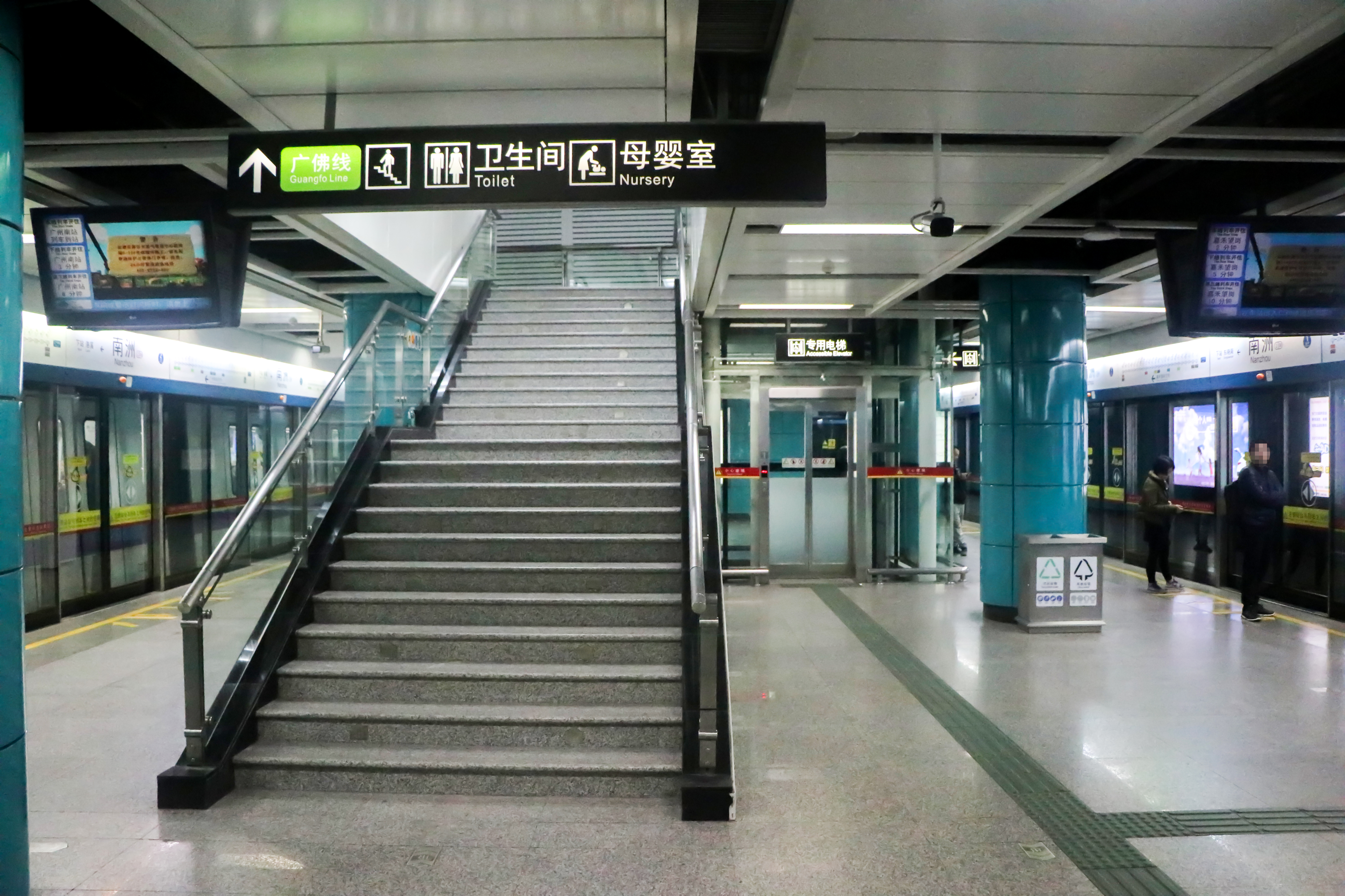 广州地铁南洲站